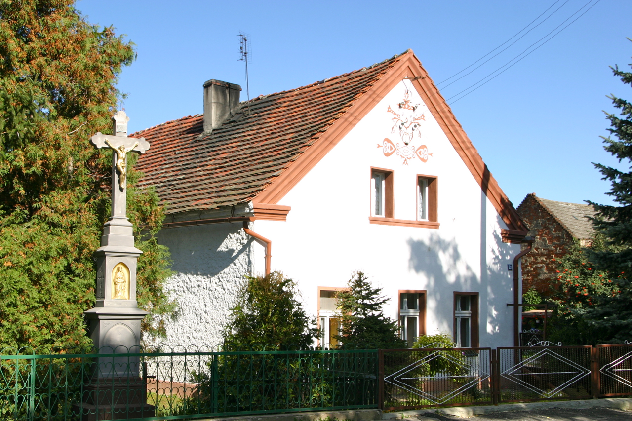 Stare Kotkowice (dodatkowa nazwa w j. niem. Alt Kuttendorf) – wieś w Polsce położona w województwie opolskim, w powiecie prudnickim, w gminie Głogówek.